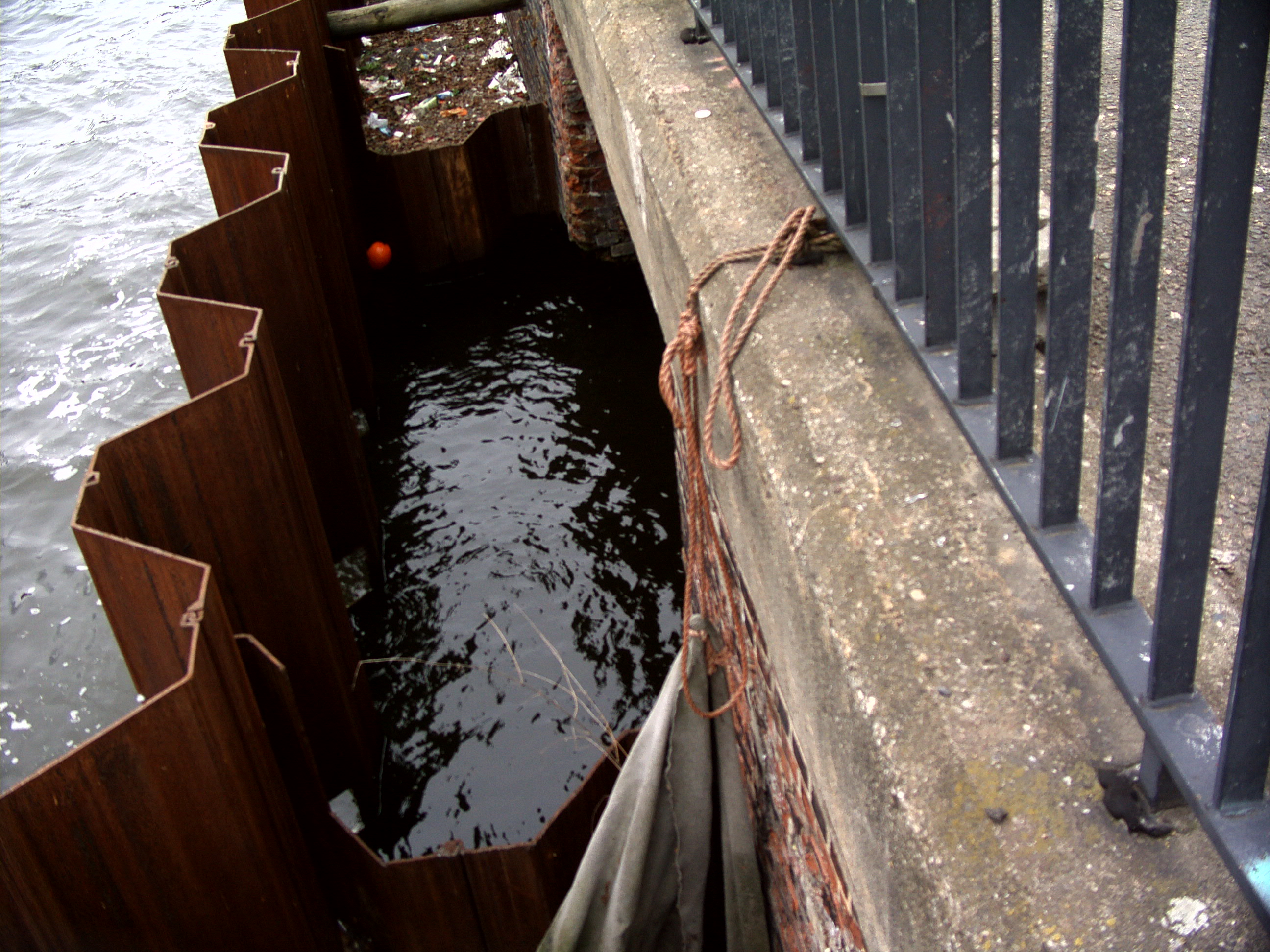 Die historische Mündung der Panke liegt 90 Meter unterhalb der Friedrchstraße in Berlin-Mitte, gegenüber dem Bahnhof Friedrichstraße. Dieser historische Pankelauf wurde 1961 mit dem Bau der Berliner Mauer abgetrennt und leergelegt. Die geplante Wiedereinrichtung dieses (Ost-)Abschnitts als Stadt- oder Südpanke ist noch nicht erfolgt, da die Bauarbeiten in diesem Gebiet in den 2010er Jahren noch in Gang sind. So hat das (historische) Mündungsloch der Panke ("am Schiffbauerdamm Nummer zwee / fließt die Panke in die Spree") kein reguläres Pankewasser. Zur Sicherung dr Ufermauer der Spree ist die Mündung durch eine Stahlspundwand versteckt. Diese Wand soll das sanierungsbedürftige Ufer vor dem Wellenschlag der Schiffe bewahren.